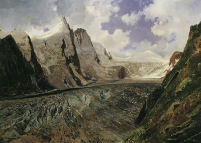 Der Großglockner mit der Pasterzetitle QS:P1476,de:"Der Großglockner mit der Pasterze" label QS:Lde,"Der Großglockner mit der Pasterze"